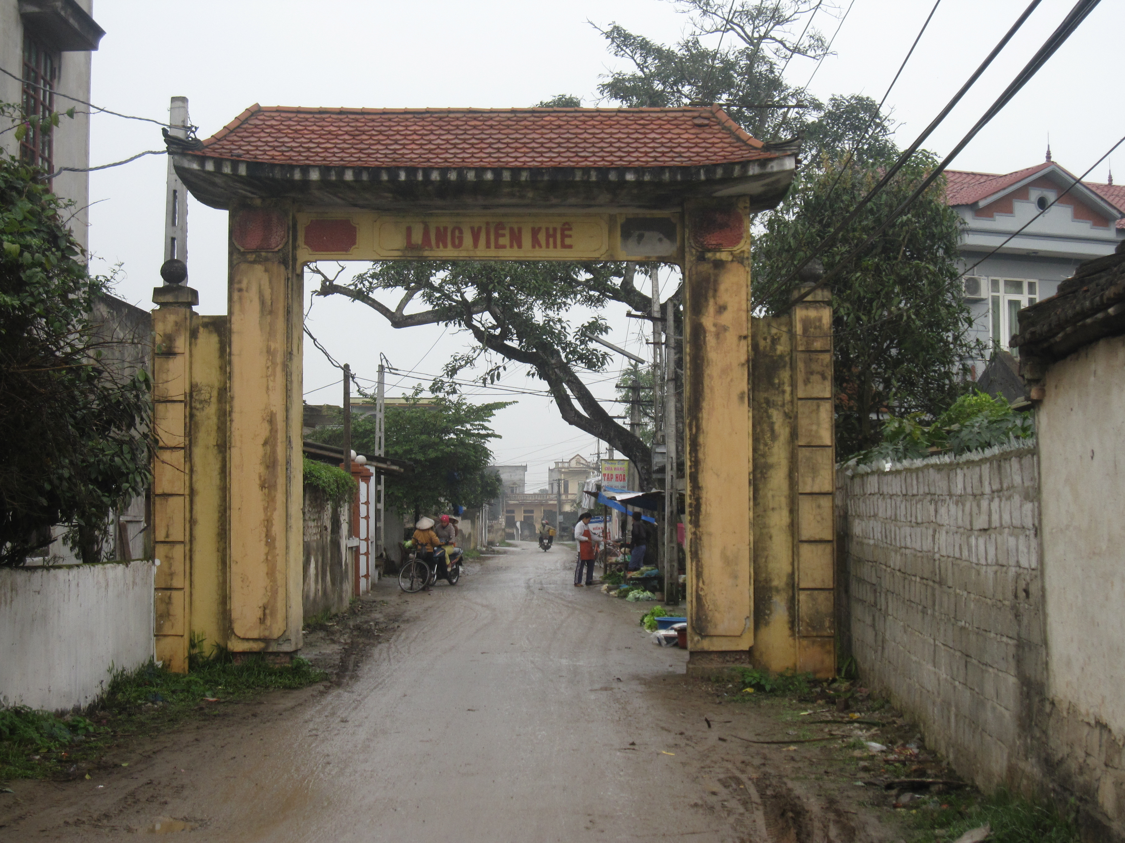 Cổng làng Viên Khê, xã Đông Anh, Đông Sơn, Thanh Hóa, Việt Nam